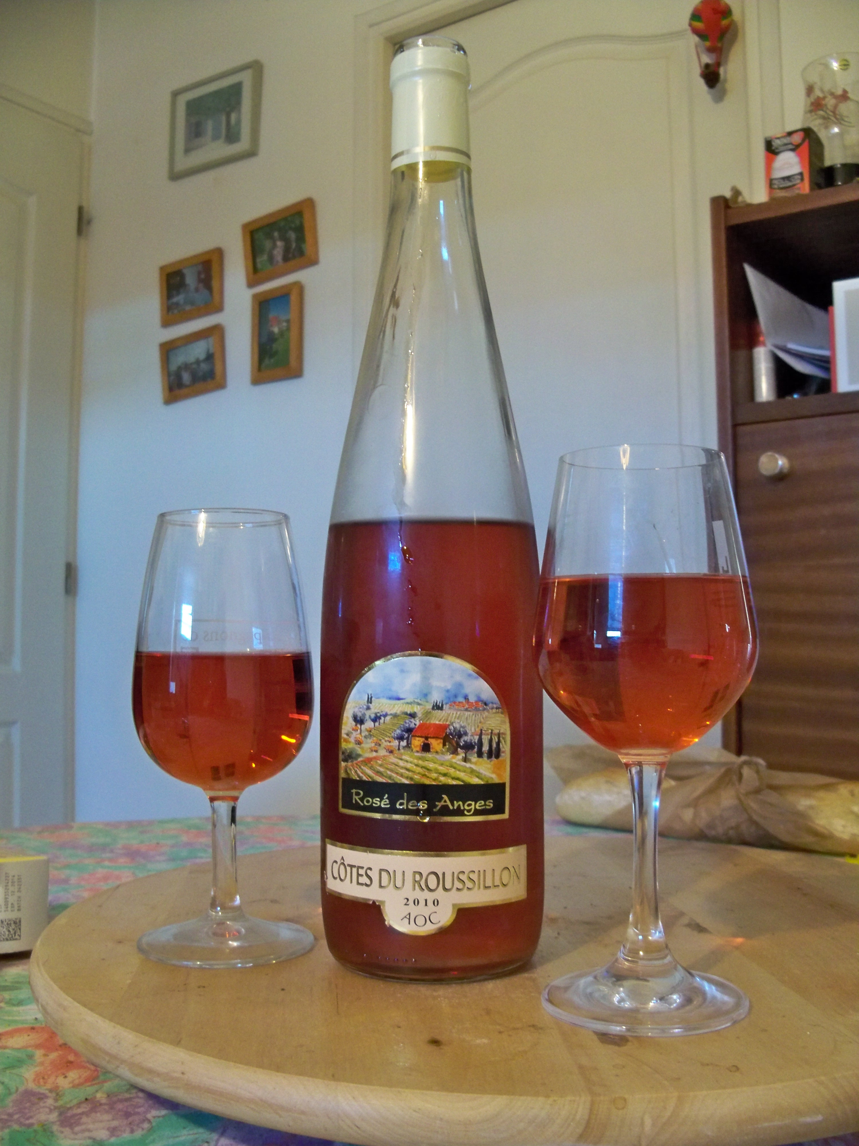 bouteille de côtes du Roussillon AOC rosé